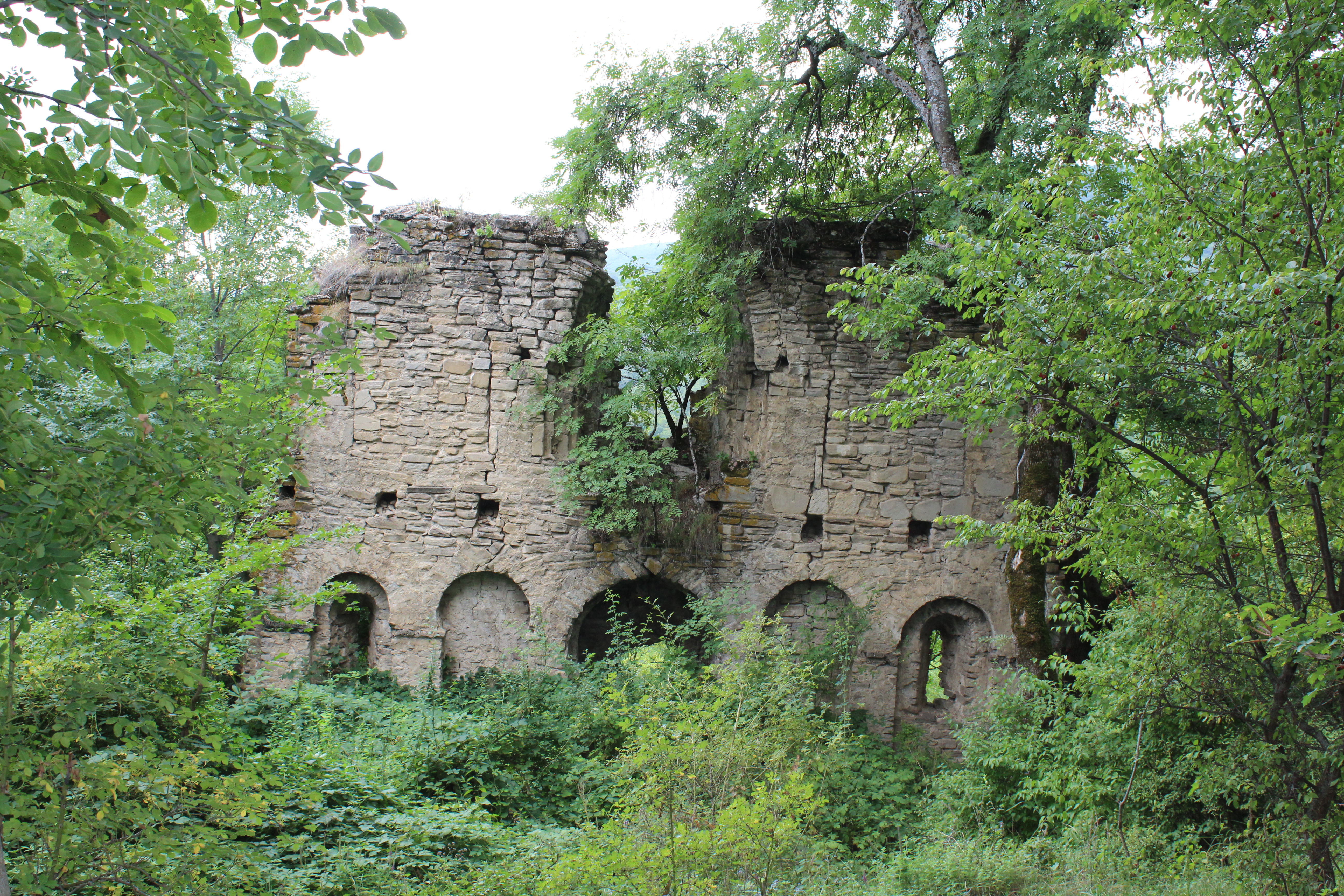 ჭერემის საეპისკოპოსო ტაძრის კომპლექსი - სასახლე